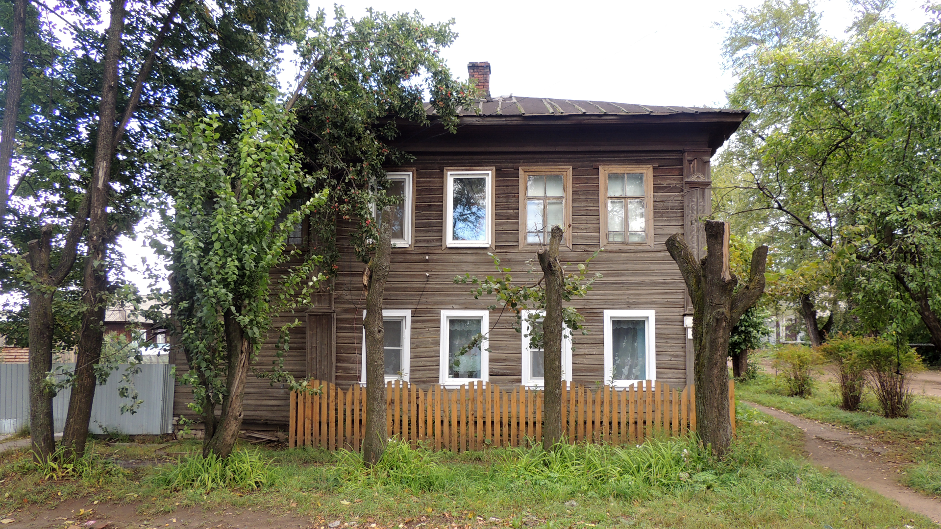 Дом, в котором жил поэт Санников Г.А.: улица Труда, 81, Яранск, Яранский район, Кировская область